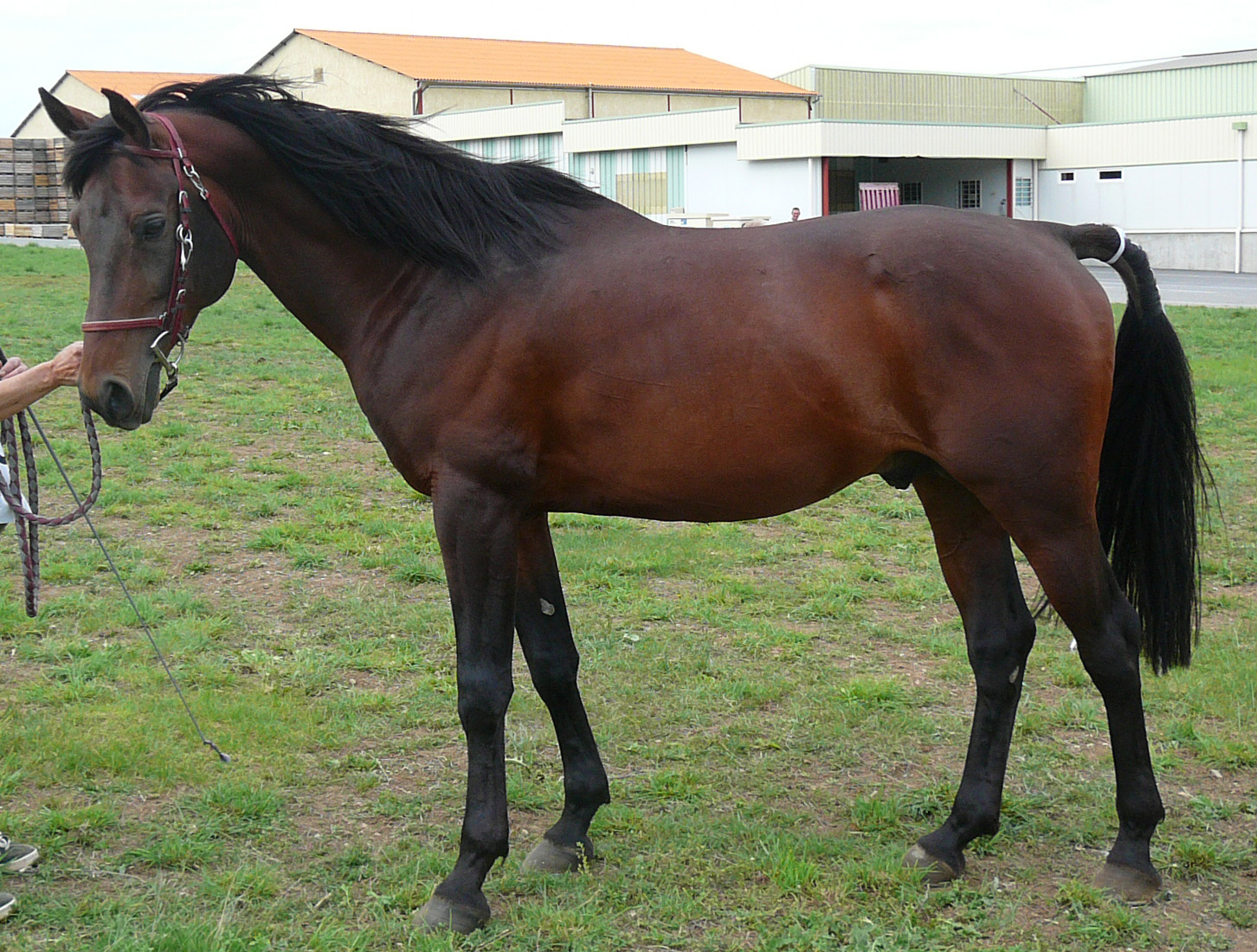 Etalon shagya de robe baie